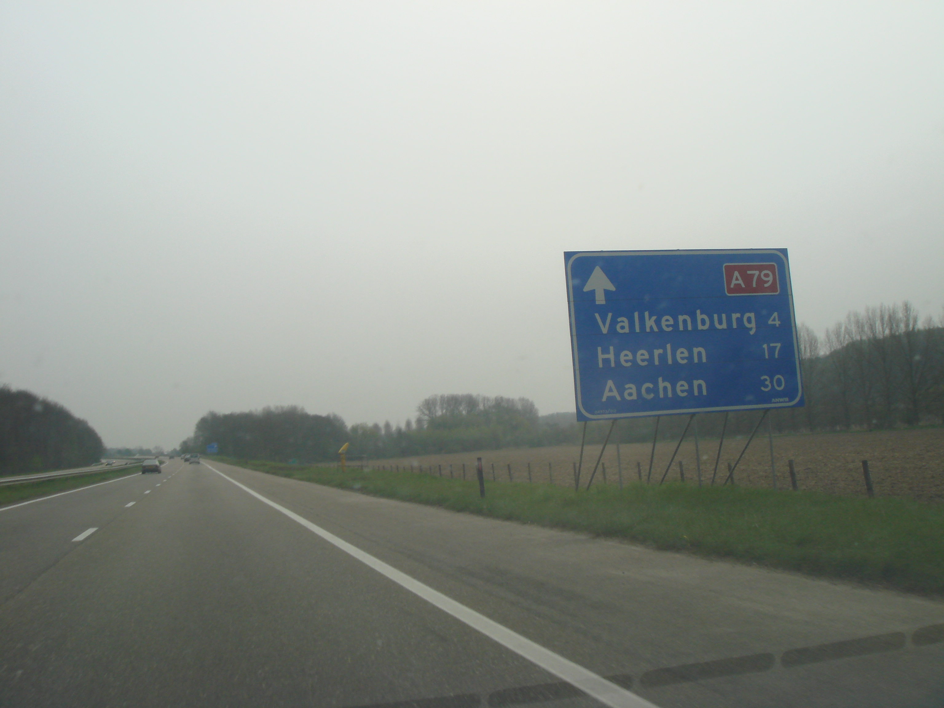 L'autoroute néerlandaise A79 vers Heerlen